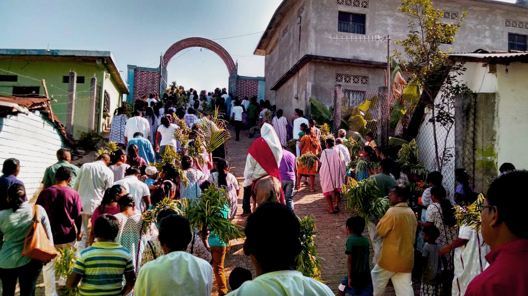 Procesión Huehuetonoc, Mpio. de Tlacoachistlahuaca, Gro.